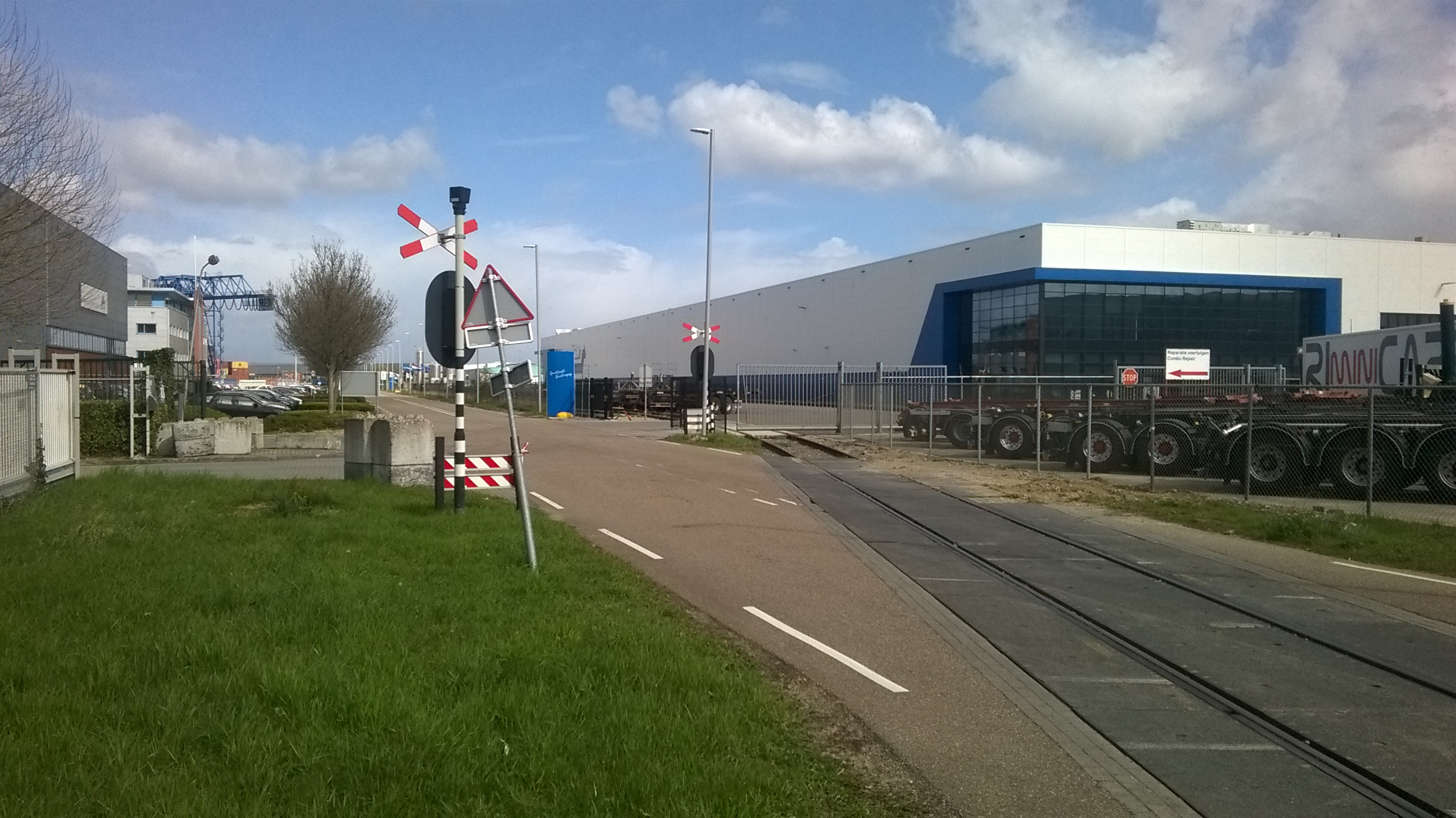 Noordelijkste spoorwegovergang over de Holtum-Noordweg in Born. De blauwe kraan linksachter is van Barge Terminal Born. Foto genomen richting het noord-oosten.